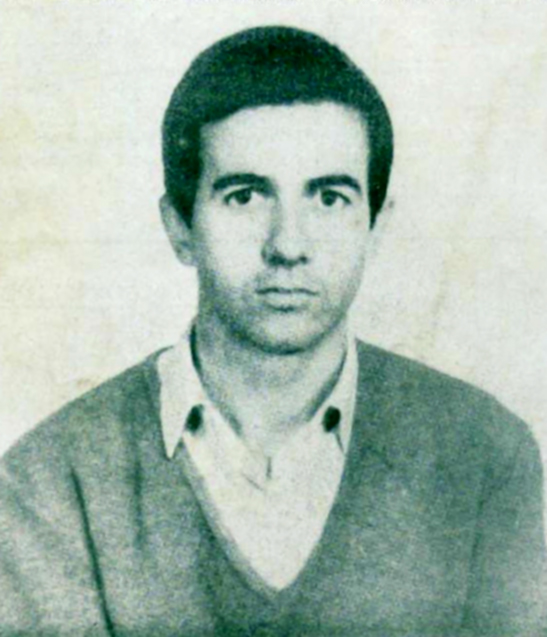 Juan José Cabral, estudiante argentino asesinado por la policía.